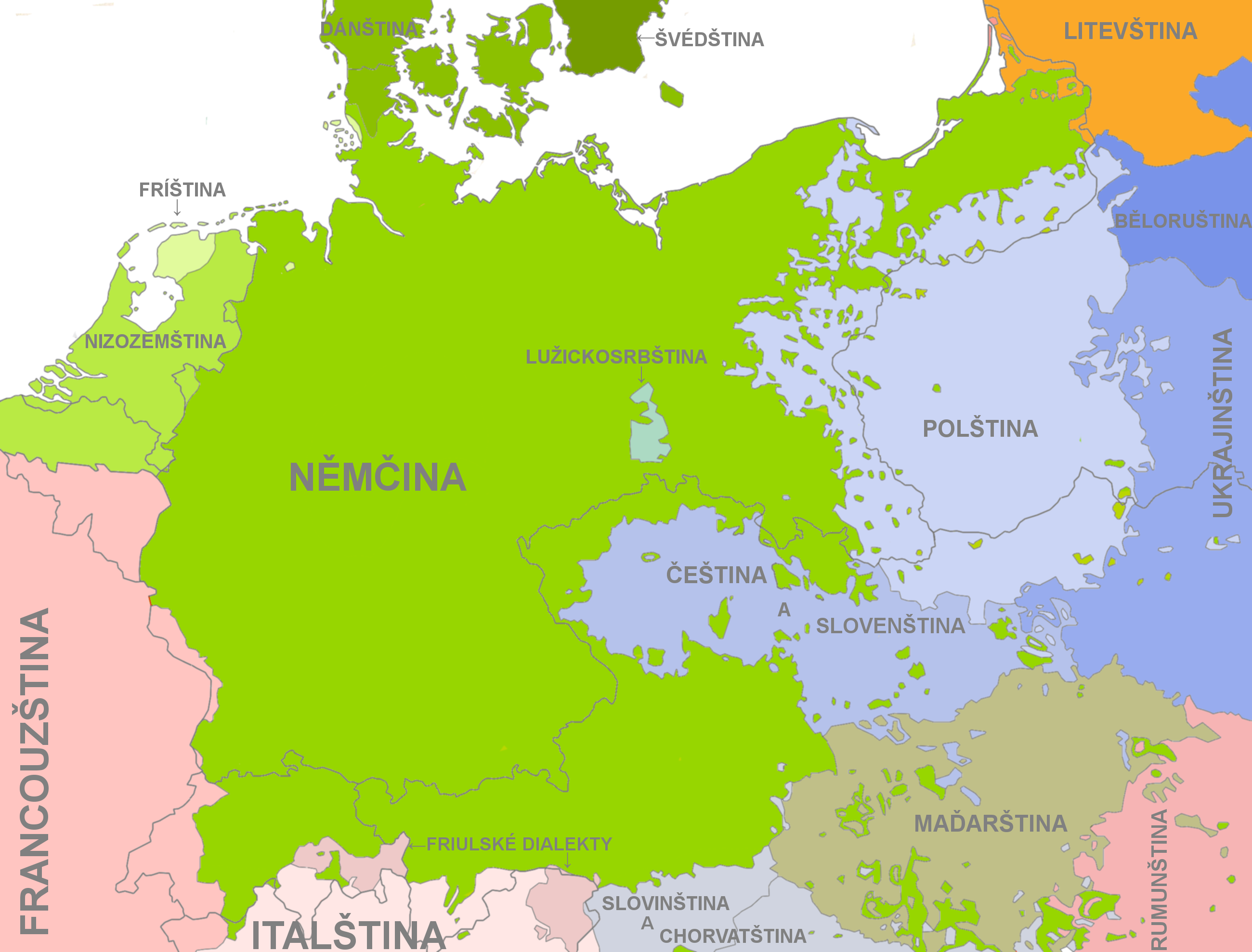 Rozšíření jazyků ve střední Evropě v roce 1910.